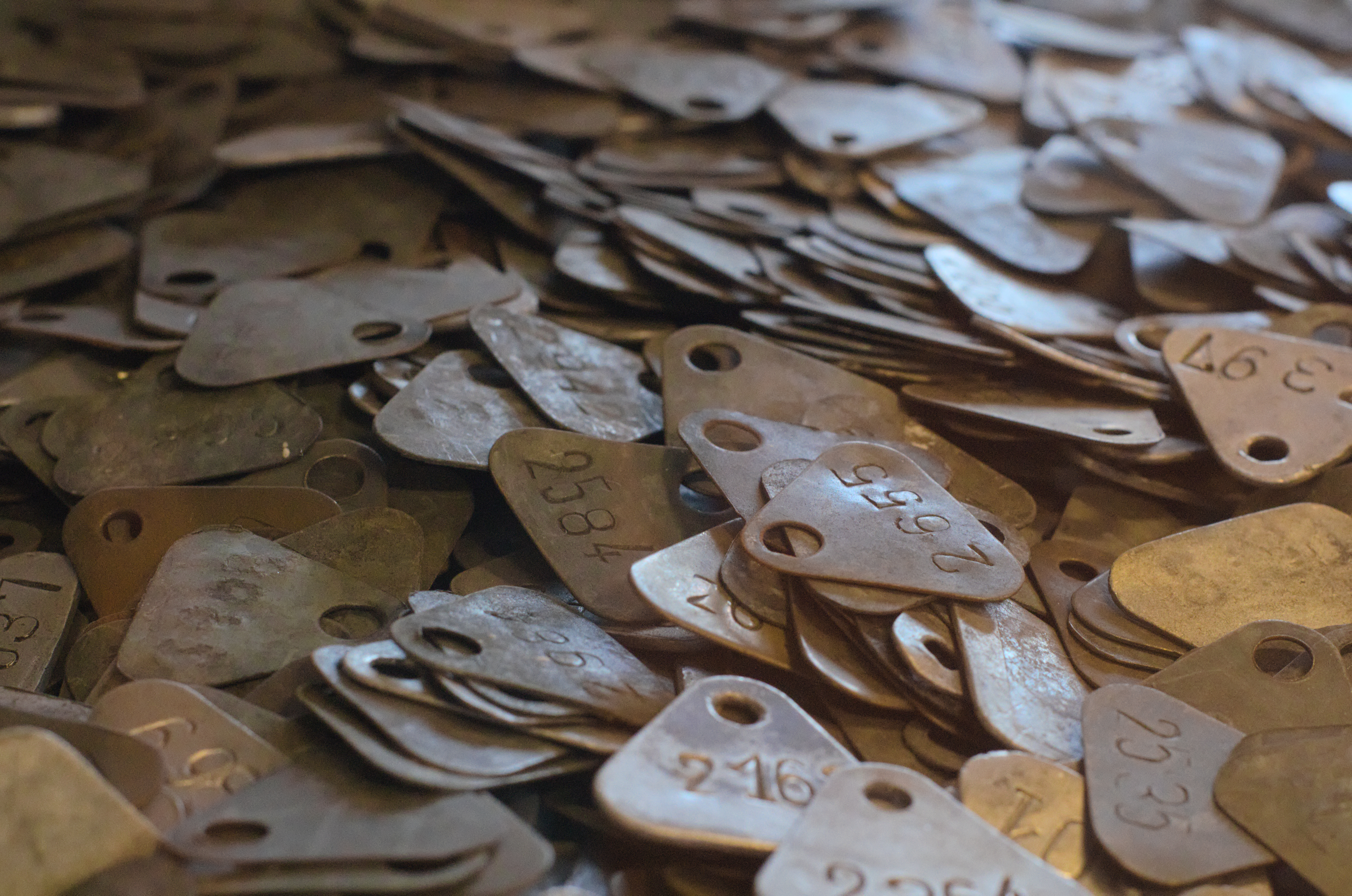 marki górnicze z trzeciej zmiany eksponowane na terenie Starej Kopalni w Wałbrzychu